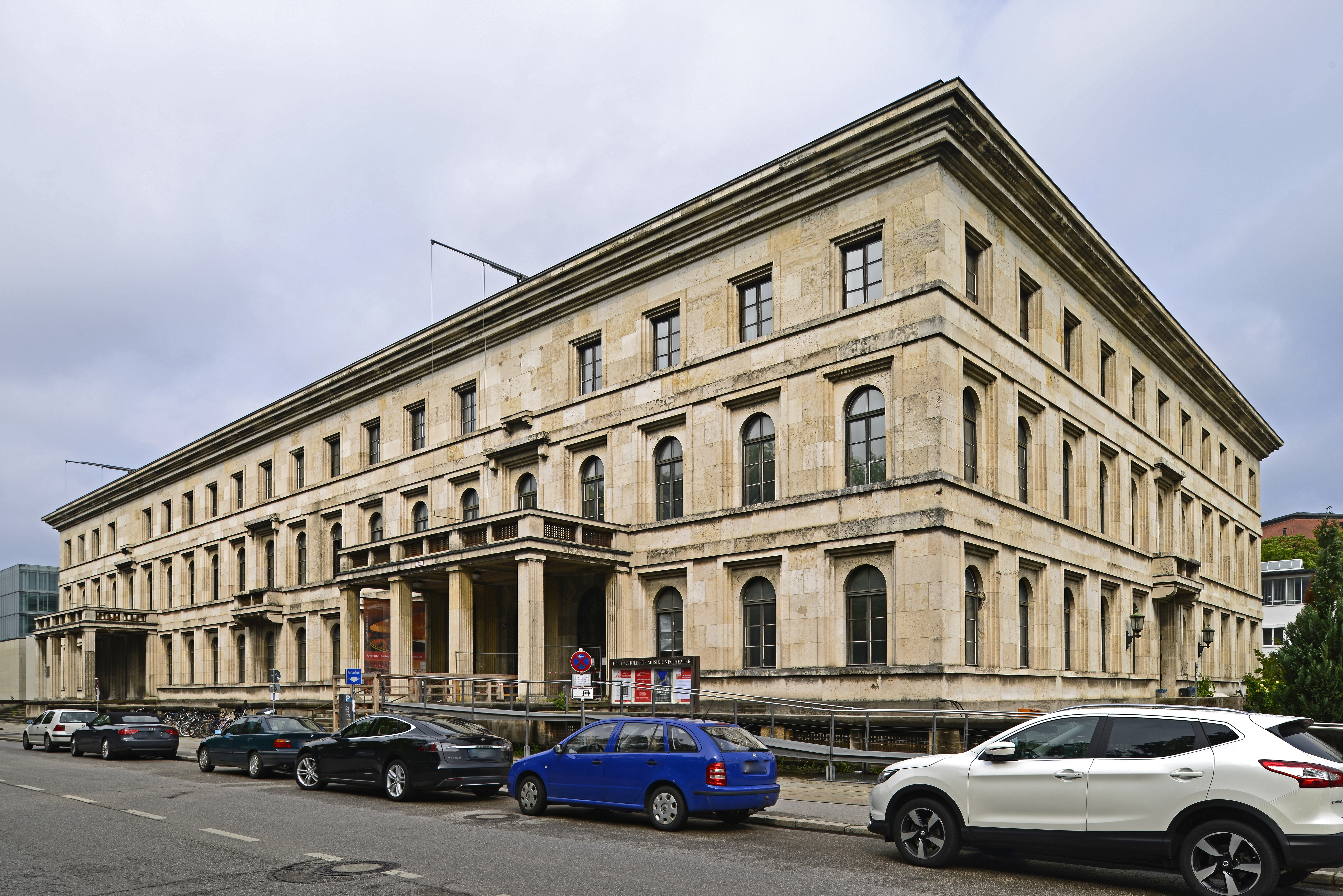 München, Fassadenansicht Arcisstraße 12.